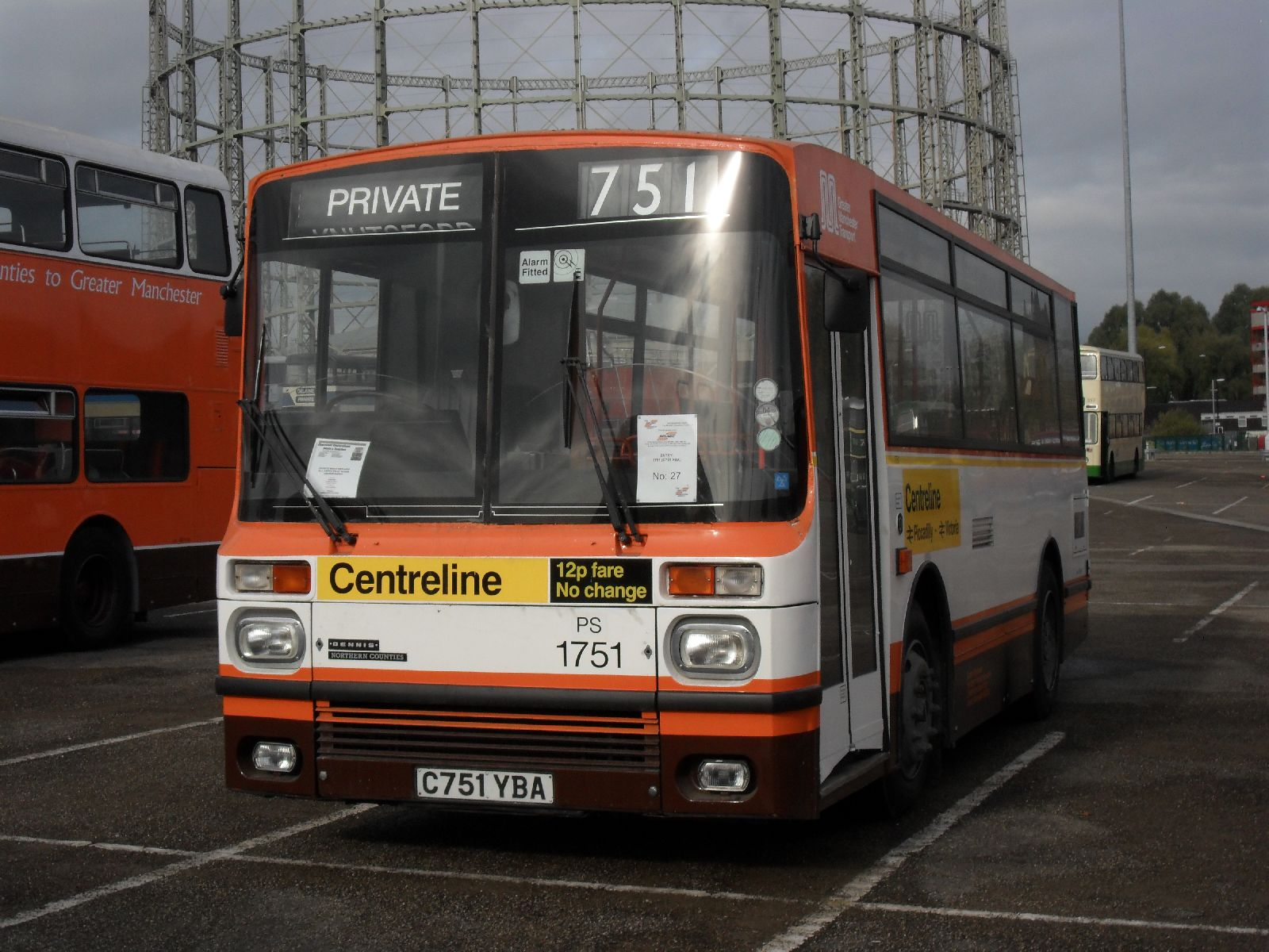 SAM_2614